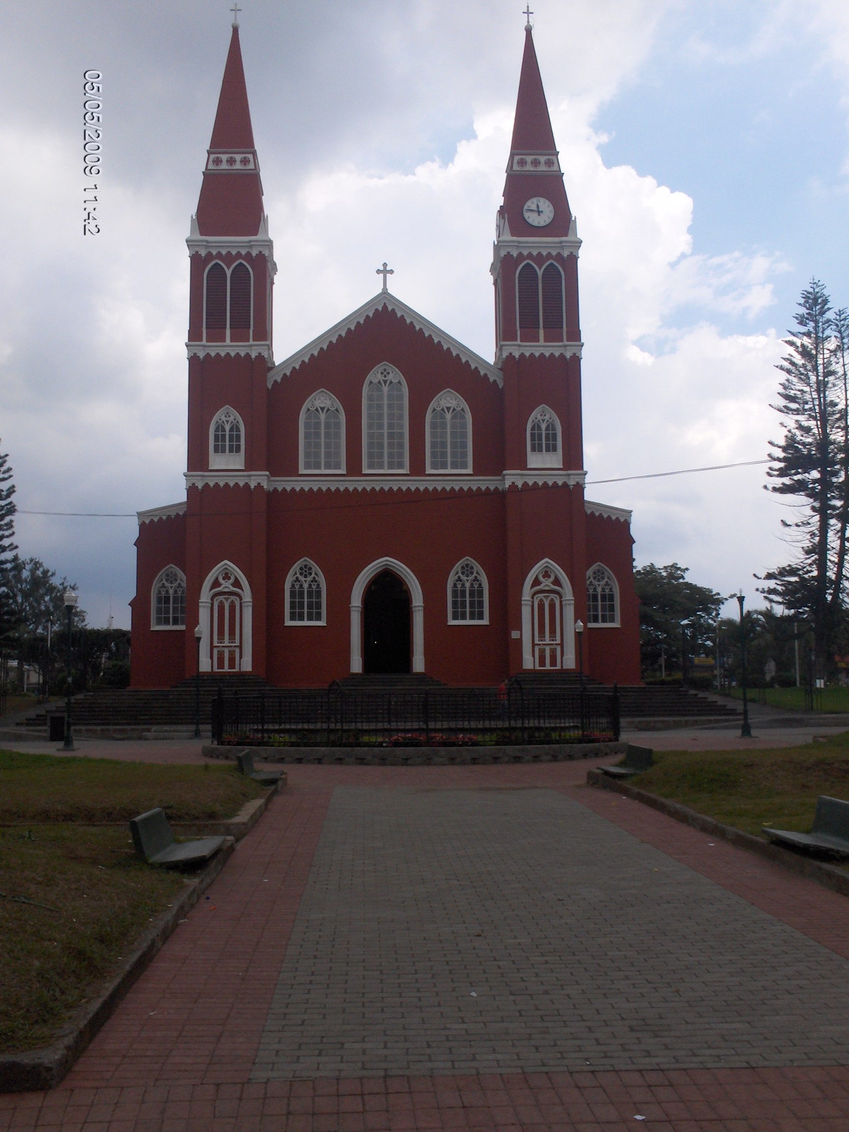 Fotografía Actual